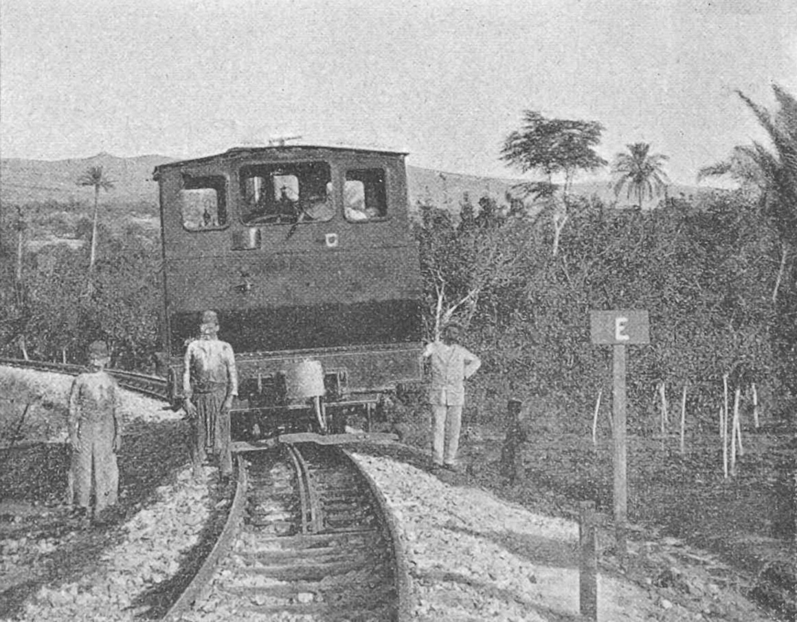 Beginn der Zahnstange hinter Beirut